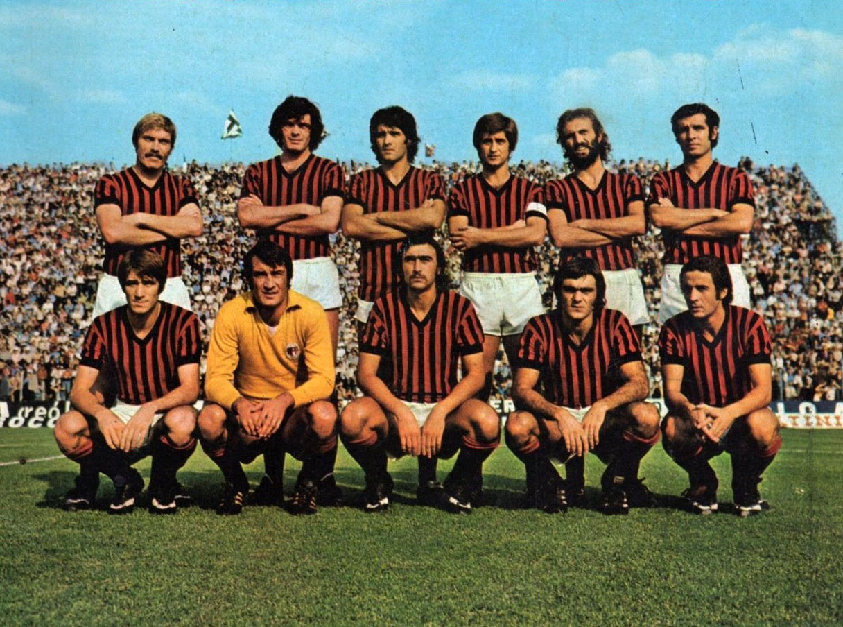 Una formazione del Milan nella stagione 1974-75.